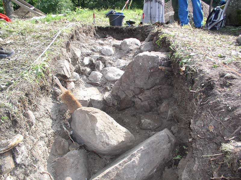 Utgrävningen vid Rolfstorps kyrka